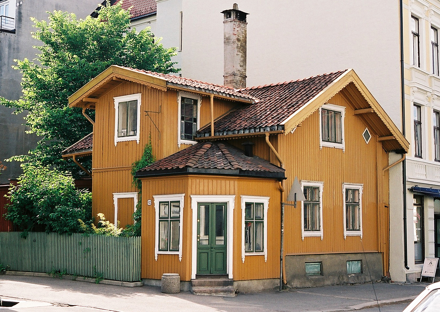 Briskebyvegen 62, Oslo. Et av de få bevarte husene fra gamle Briskeby. Trebygning, boligeiendom fra 1800-tallet, fjerde kvartal.